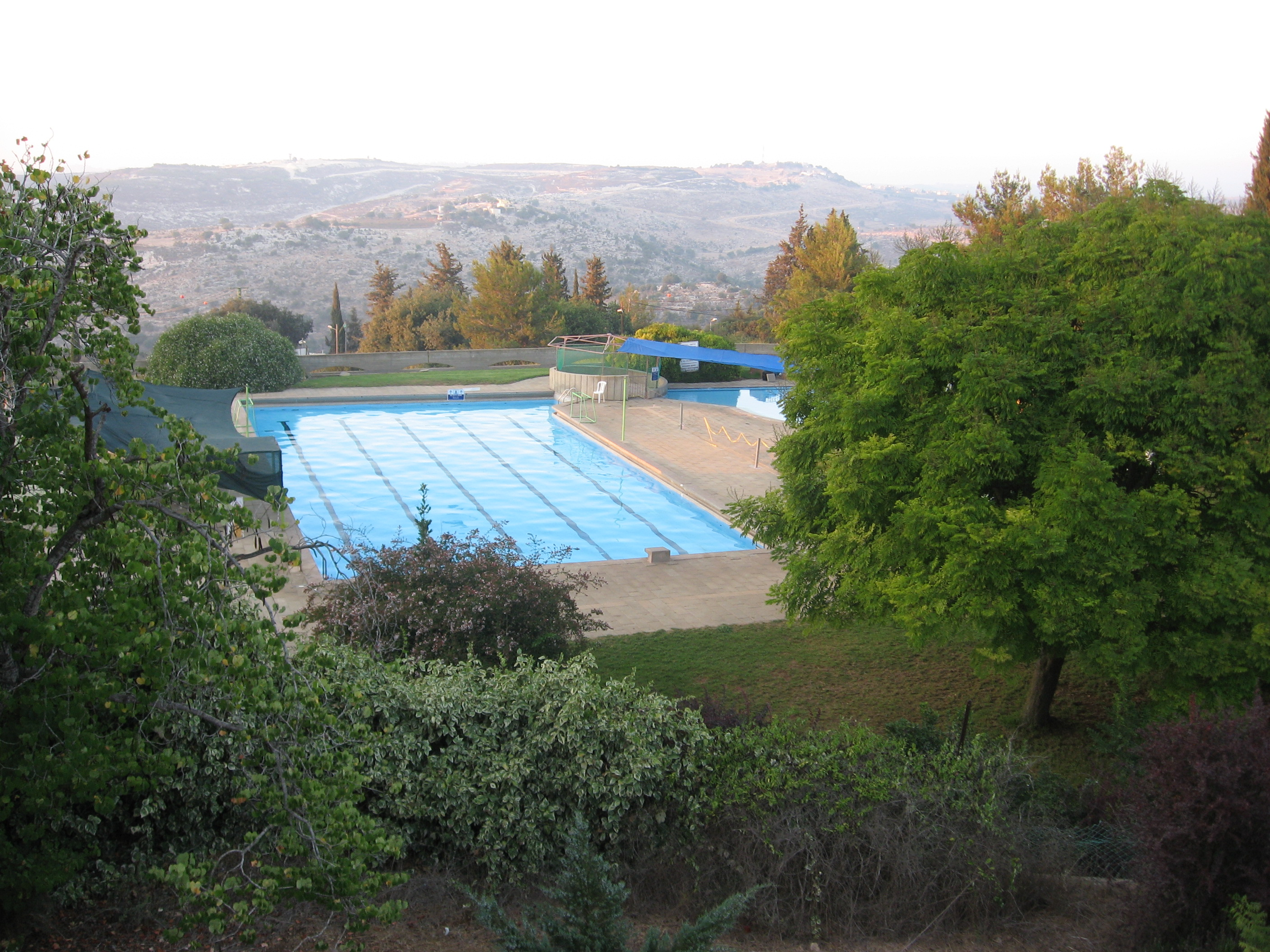 בריכת השחיה באדמית